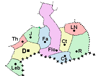 Carte du canton de Delle (Territoire de Belfort)